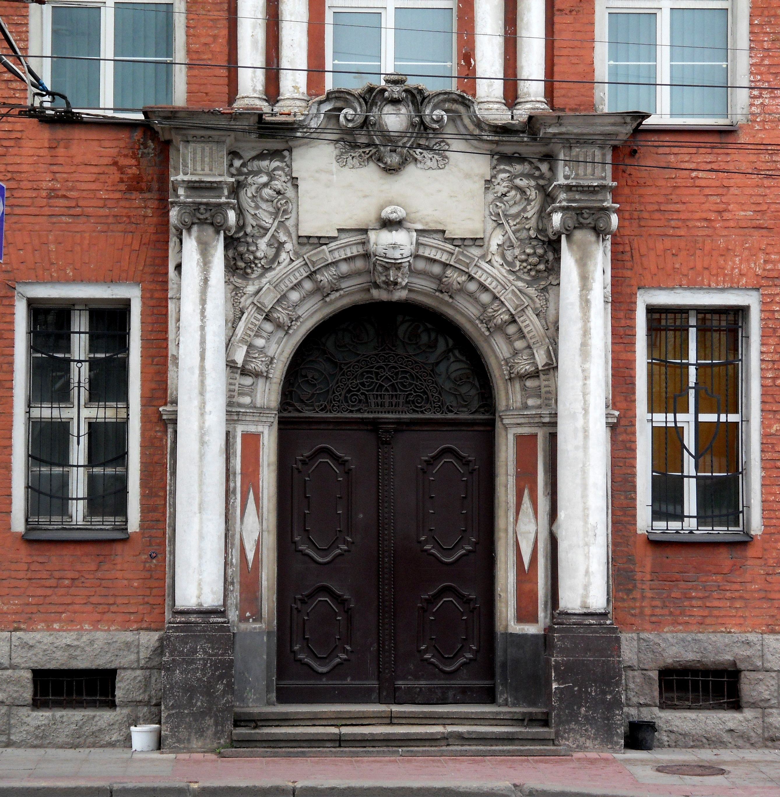 Здание полицайпрезидиума с рельефами на портале главного входа (Калиниградская область, Калининград, советский пр., 3-5)